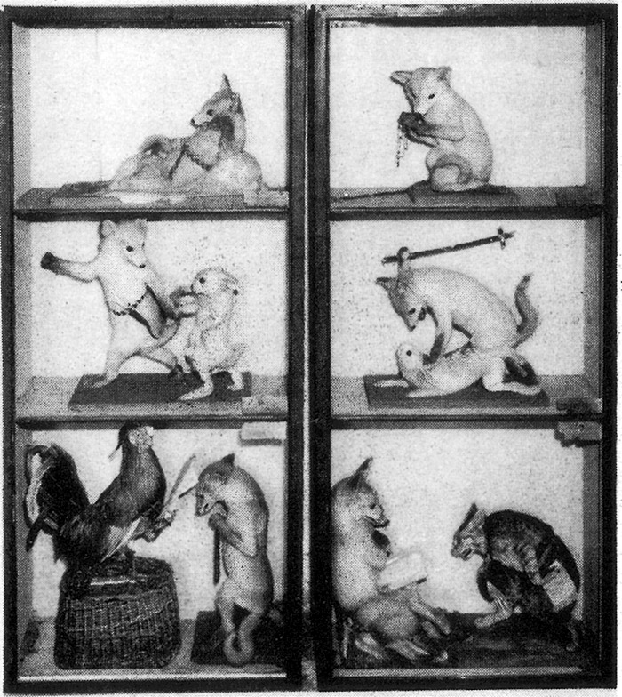 Tierdiorama von Hermann Ploucquet mit 6 Szenen aus dem Leben von Reineke Fuchs, 1851